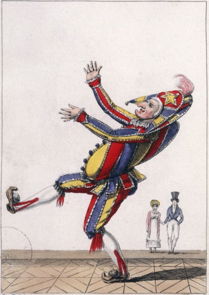 Polichinelle aux eaux d'Enghien, vaudeville de Francis, Dartois et Saintine: costume de Pitrot (Gustave) / gravé par Maleuvre, eau-forte, en coul. ; 23 x 14,5 cm